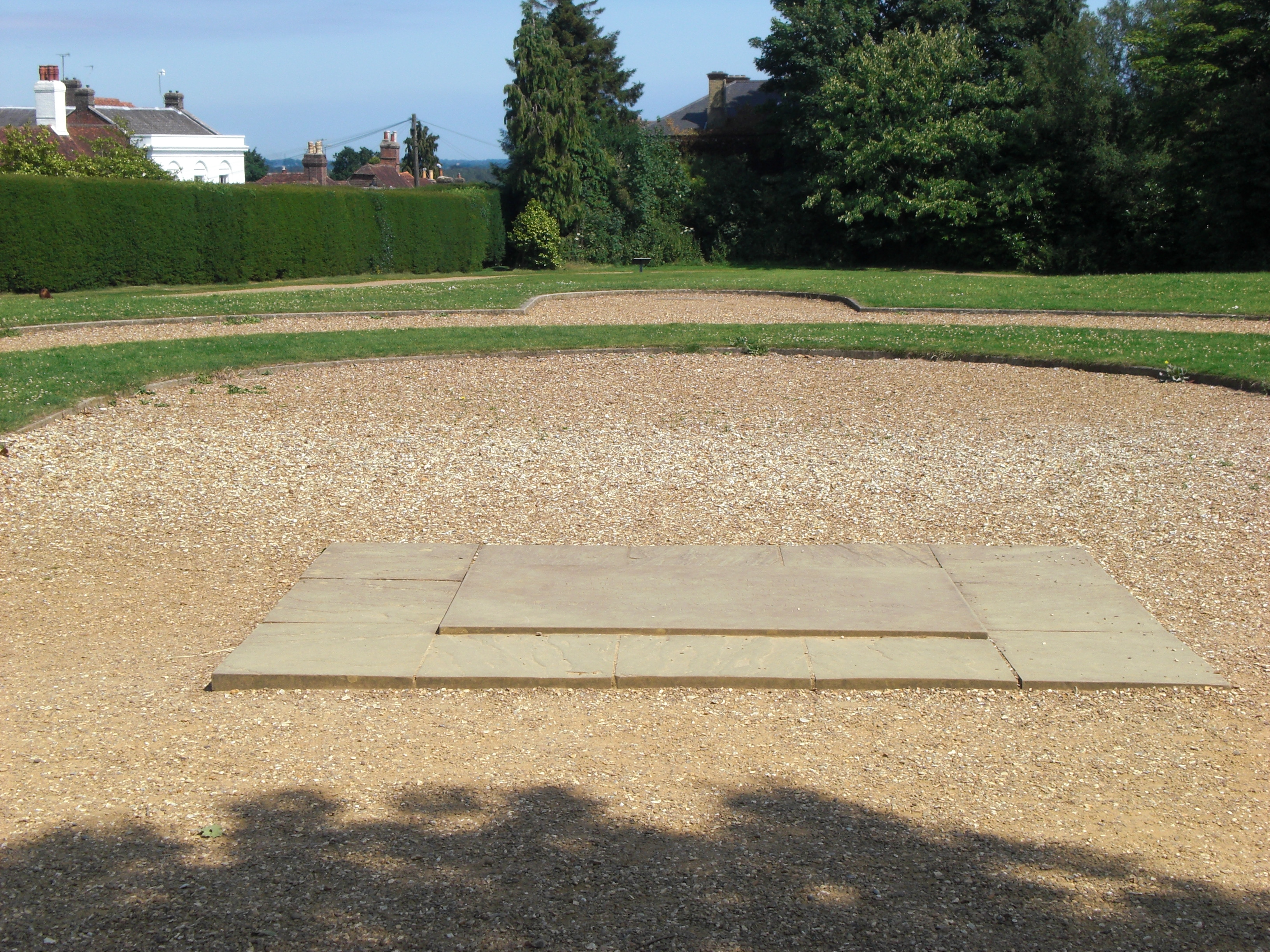 Gedenktafel an der Stelle des Altares der geschleiften Kapelle der Battle Abbey